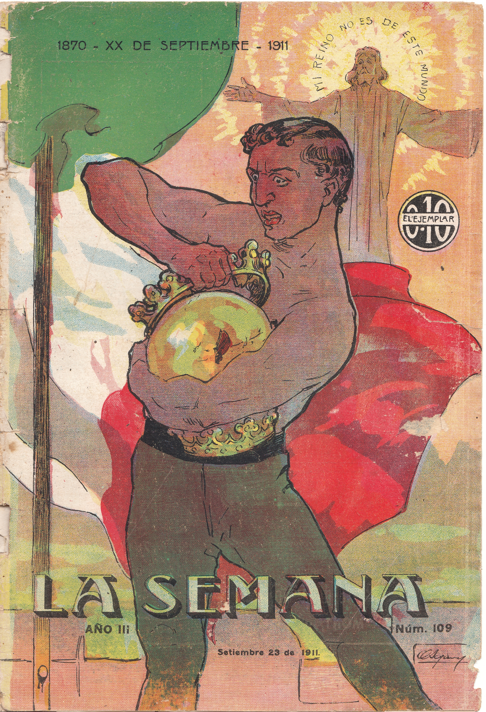 Dibujo de portada de Orestes Acquarone correspondiente al nº 109 de la revista "La Semana" fechada 23 de setiembre de 1911.